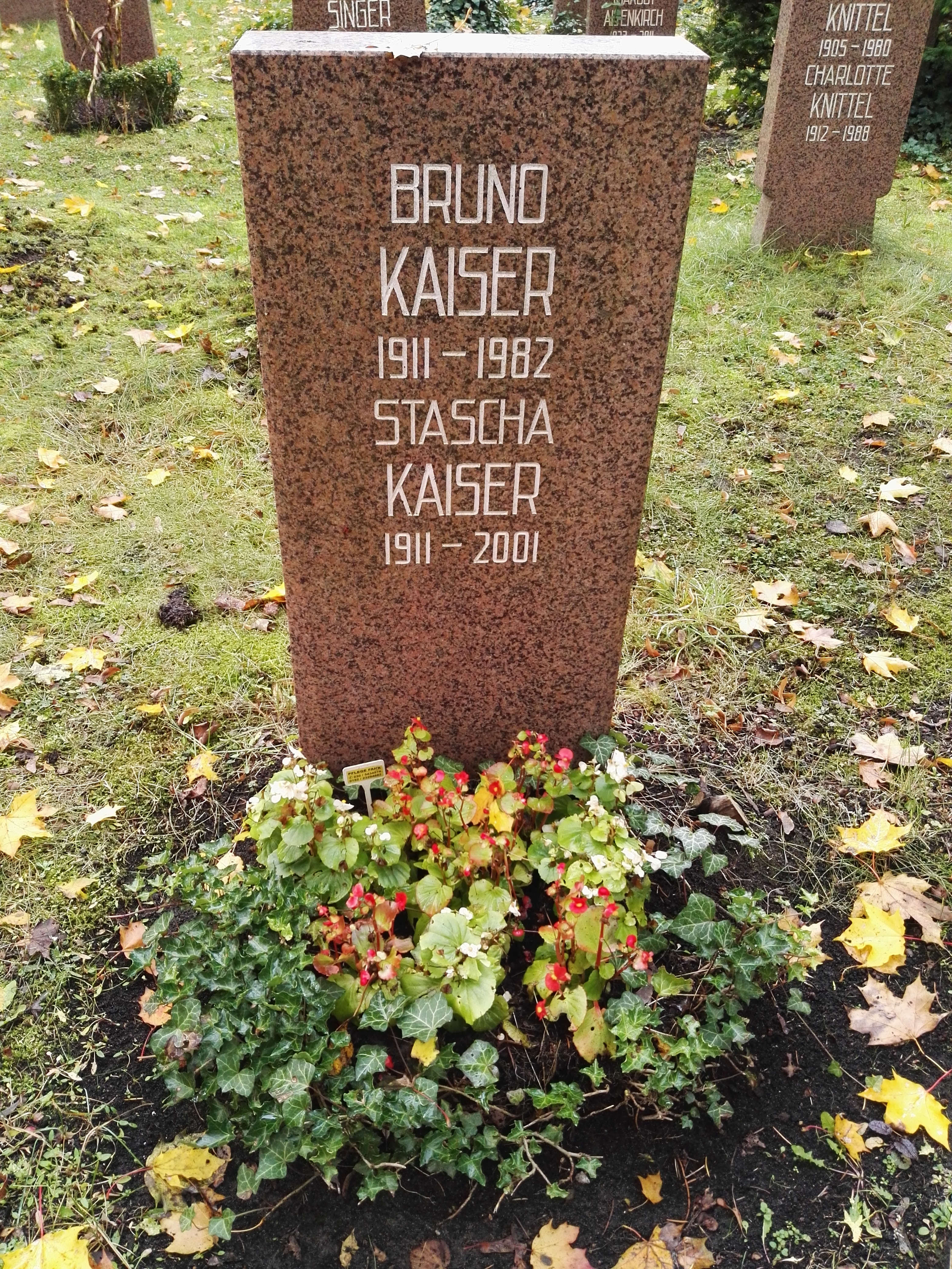 Grab von Bruno Kaiser und Stascha Kaiser auf dem Sozialistenfriedhof des Zentralfriedhofs Friedrichsfelde